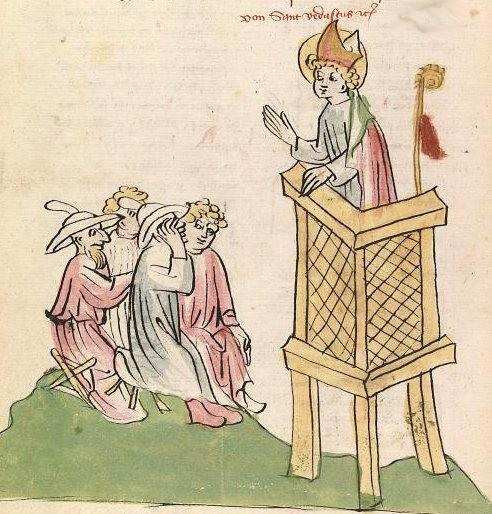 Sint-Vedastus predikt heidenen, eerste kwart 15e eeuw. Afbeelding waarschijnlijk uit de Legenda Aura. Auteursrecht vervallen wegens ouderdom. Door kleine ingreep afbeelding enigszins aangepast.